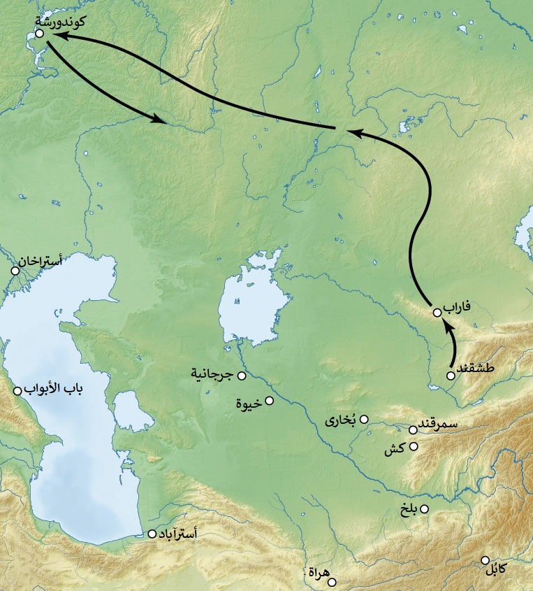 حملة تيمورلنك عبر السُهُوب الشماليَّة خلال سنتيّ 1391 و1392م، أثناء مُطاردته توقتمش خان، صاحب القبيلة الذهبيَّة.